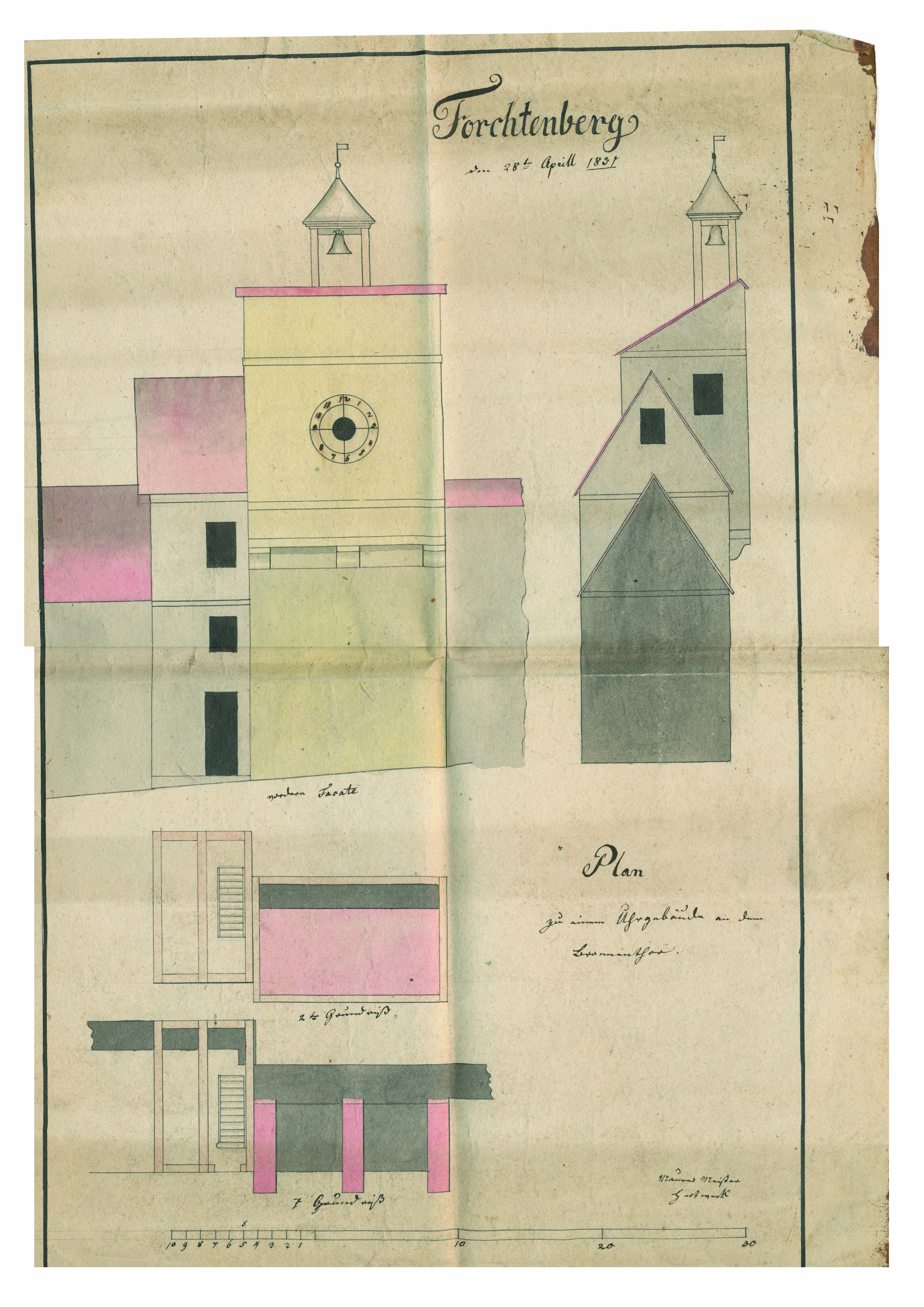 Plan vom Backhaus Turm. Der 1832 gebaut wurde nachdem das Brunnentor abgerissen wurde